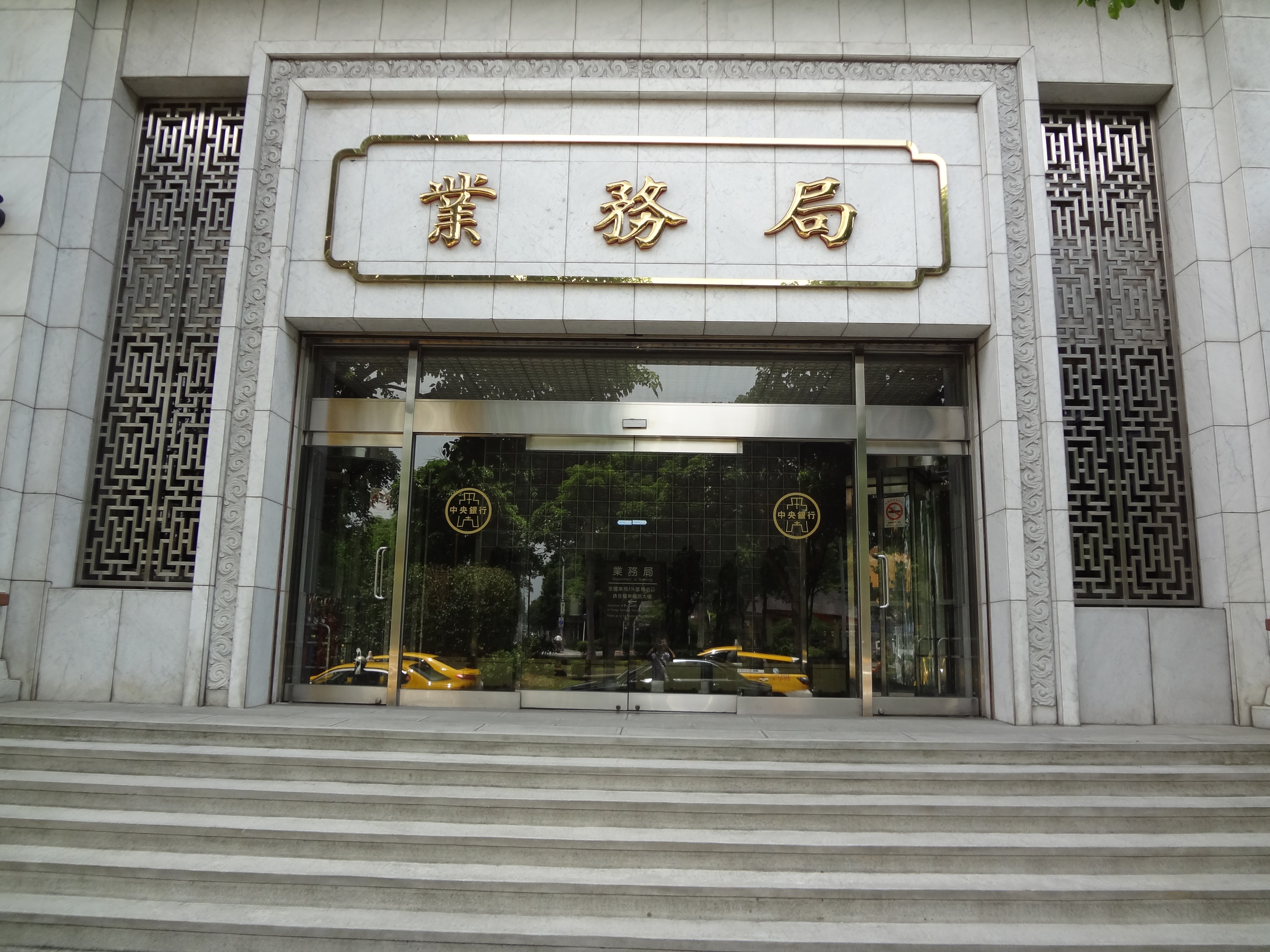 中文（台灣）: 中華民國中央銀行業務局。